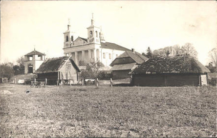 Беларуская (тарашкевіца): Раготна (Rahotna). Касьцёл па маскоўскай перабудове